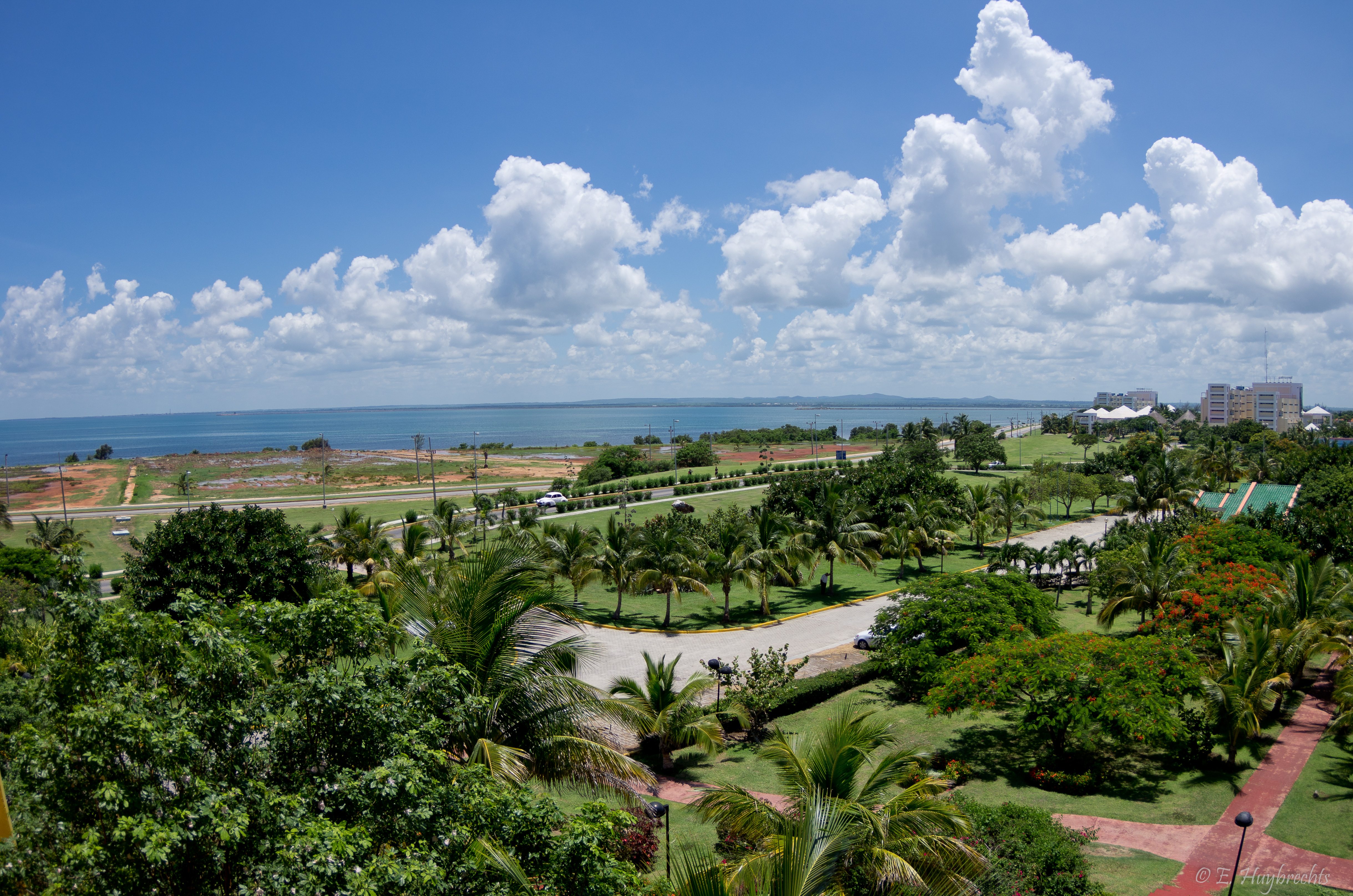 Depuis l'Hotel Solymar